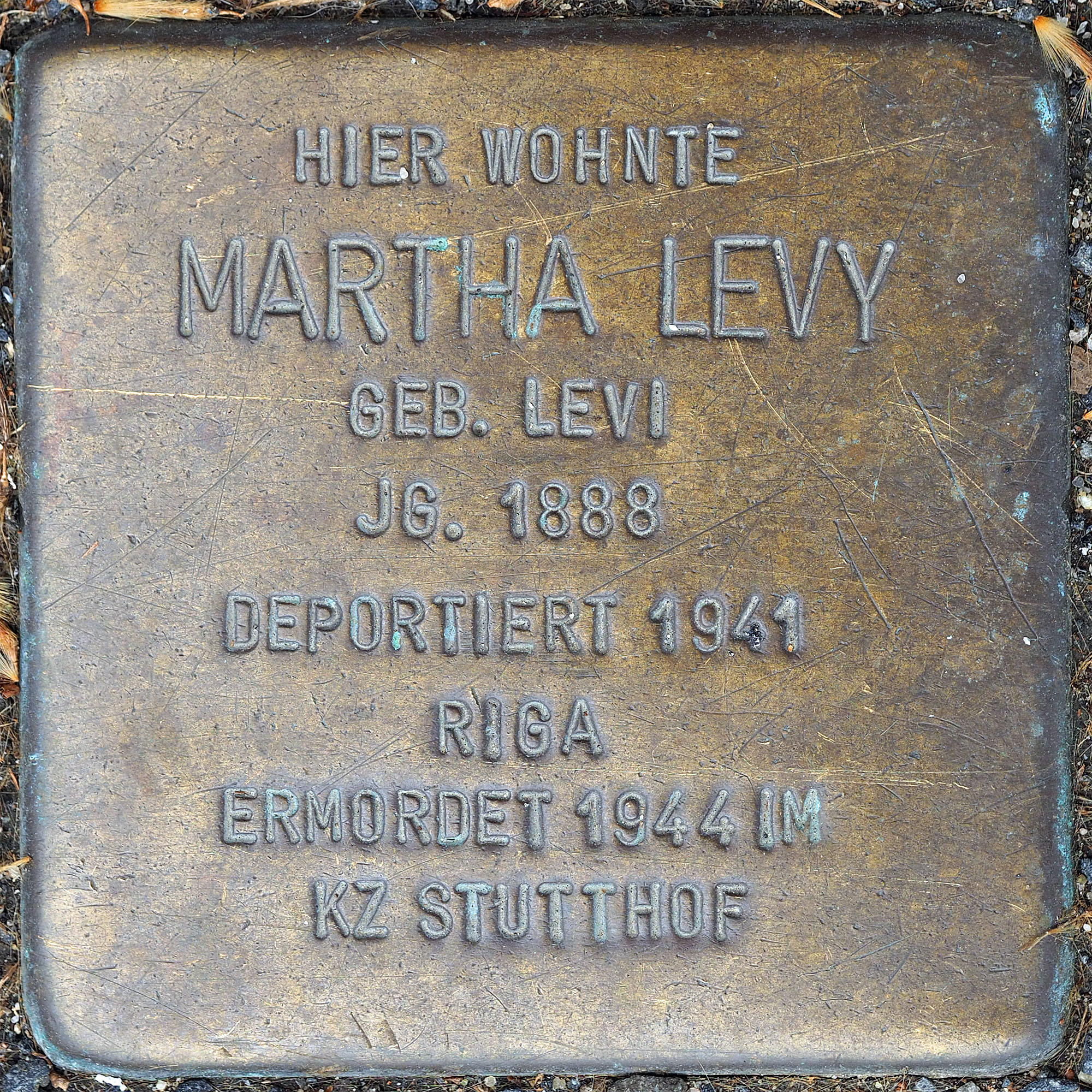 Stolpersteine MG: Levy, Martha